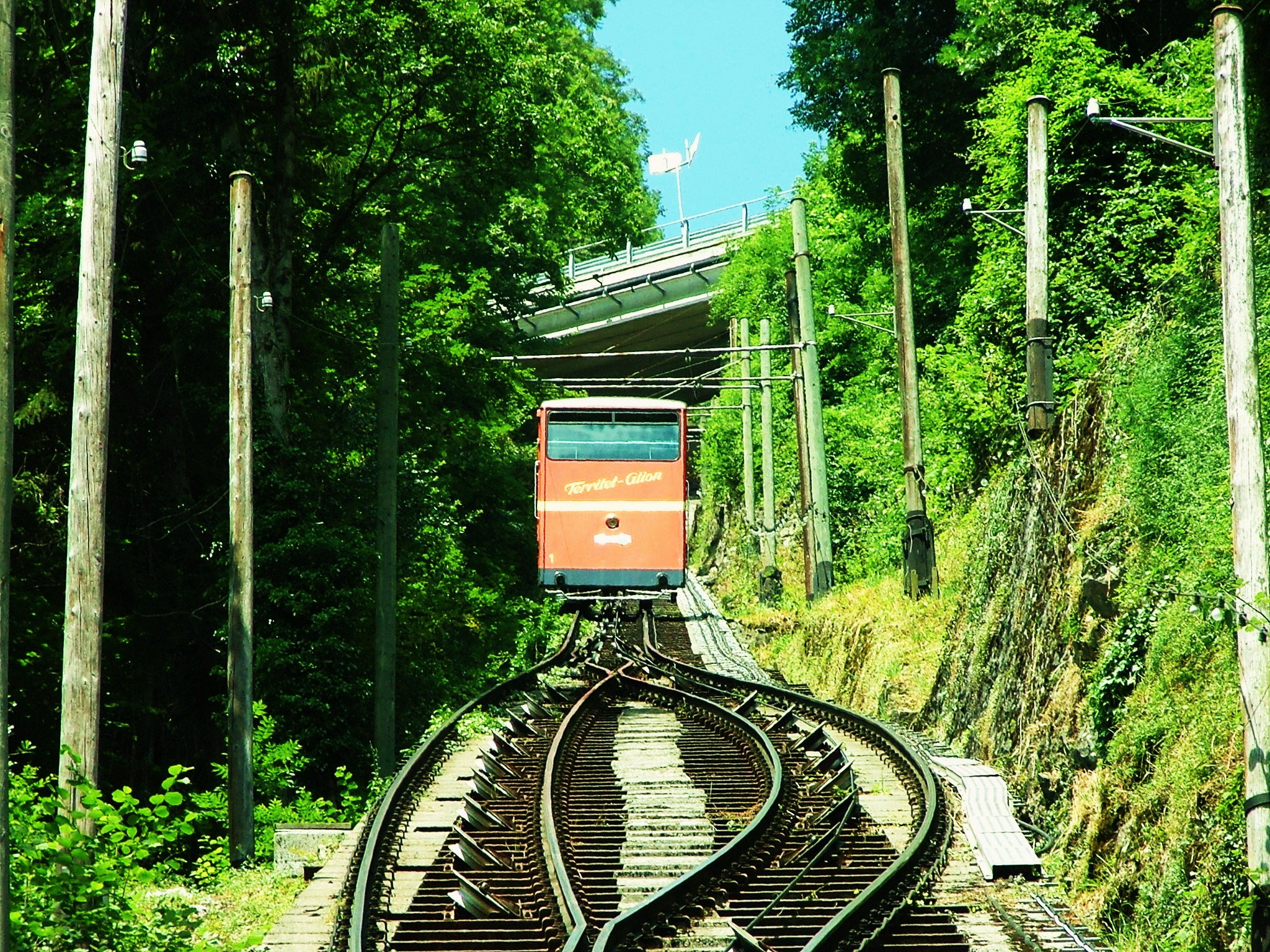 Kolej Territet-Glion w 2006r.